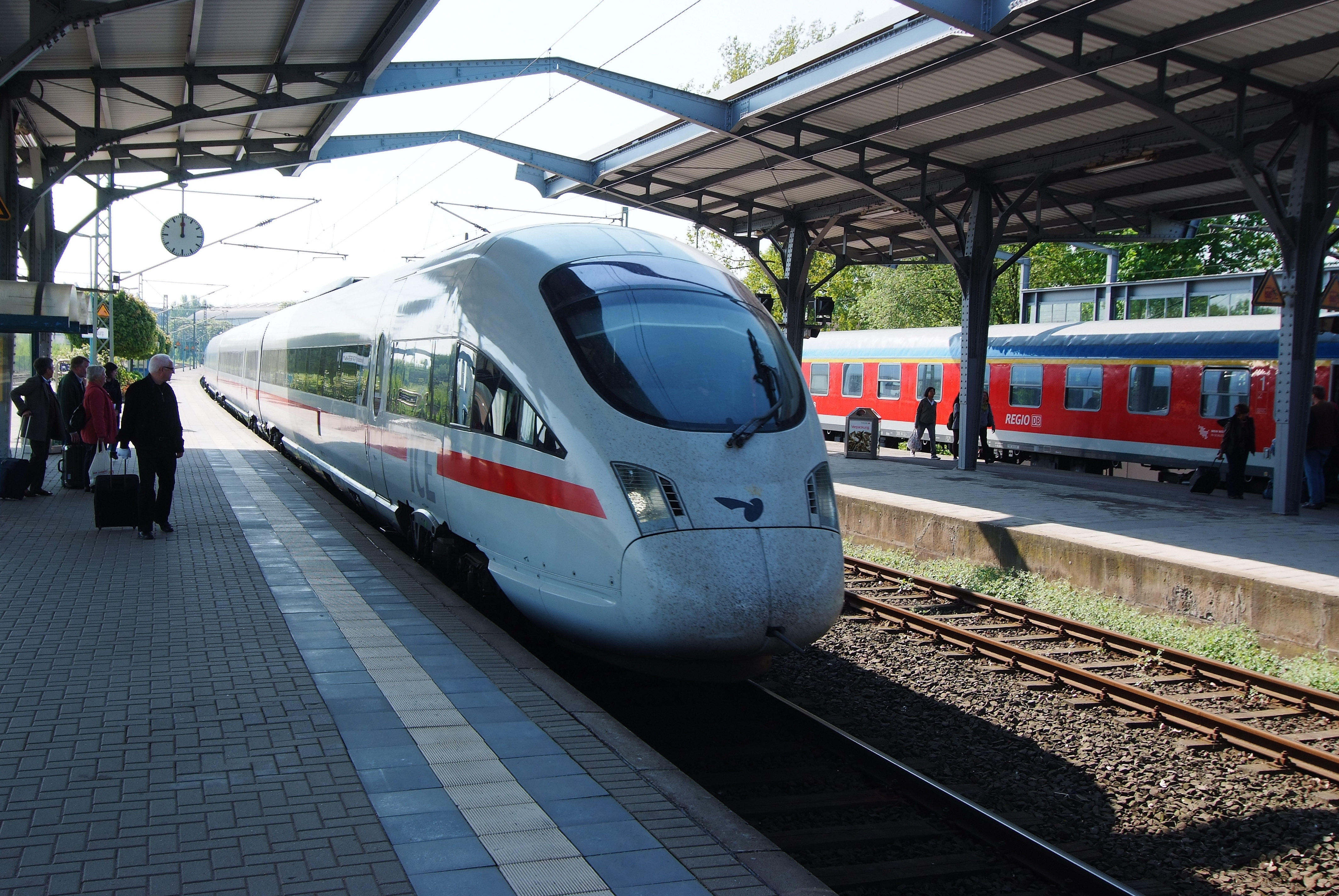 ICE TD in Rendsburg